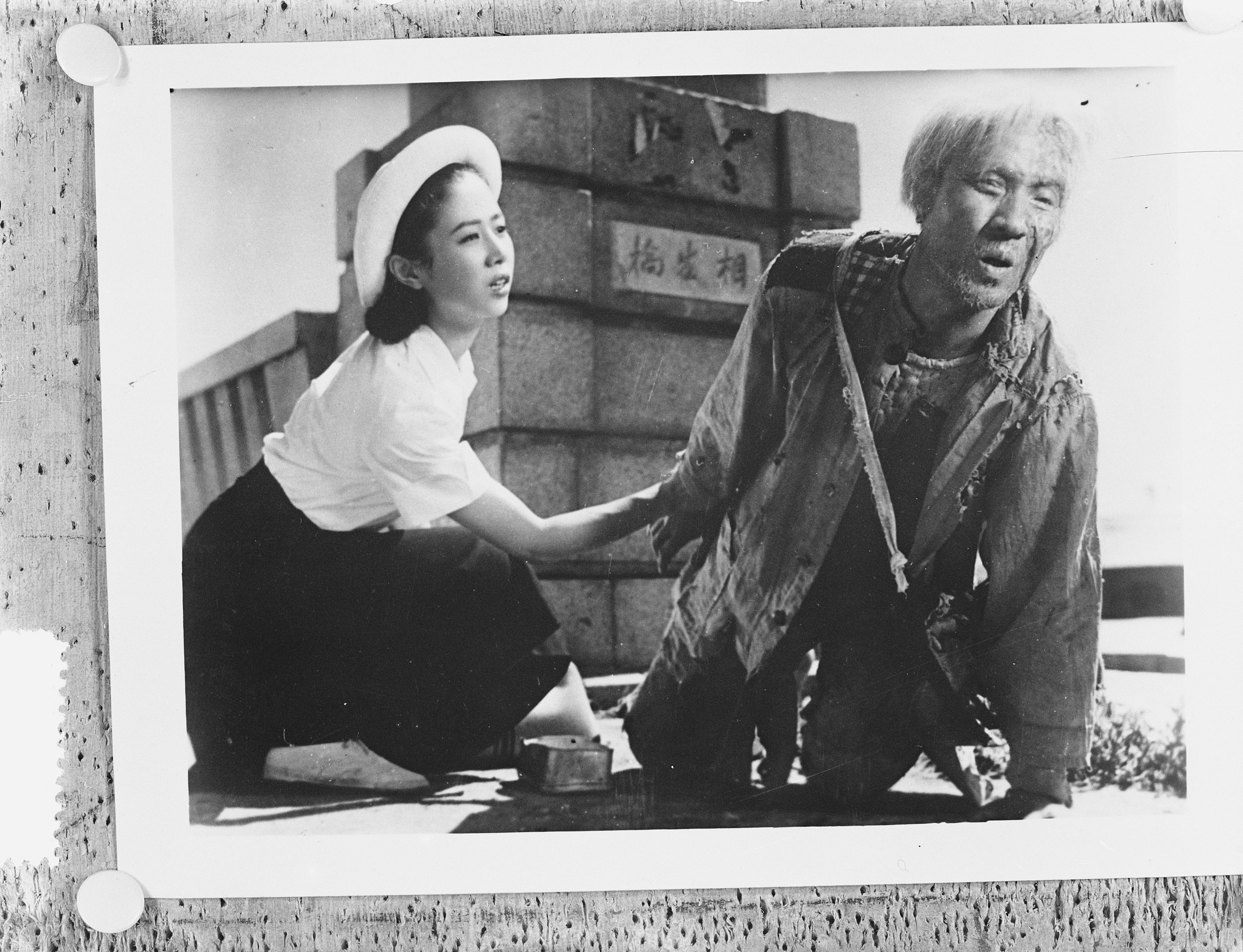 Collectie / Archief : Fotocollectie Anefo Reportage / Serie : [ onbekend ] Beschrijving : Reprodukties Hiroschima (Royal Film) Datum : 4 maart 1954 Locatie : Hiroshima Trefwoorden : FILM, Reprodukties Persoonsnaam : ROYAL Fotograaf : Doka / Anefo Auteursrechthebbende : Nationaal Archief Materiaalsoort : Glasnegatief Nummer archiefinventaris : bekijk toegang 2.24.01.09 Bestanddeelnummer : 906-3250